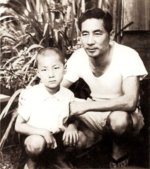 Junichiro Koizumi and his father Junya Koizumi.